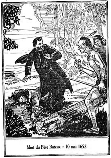 Mort du Père Buteux - 10 mai 1652